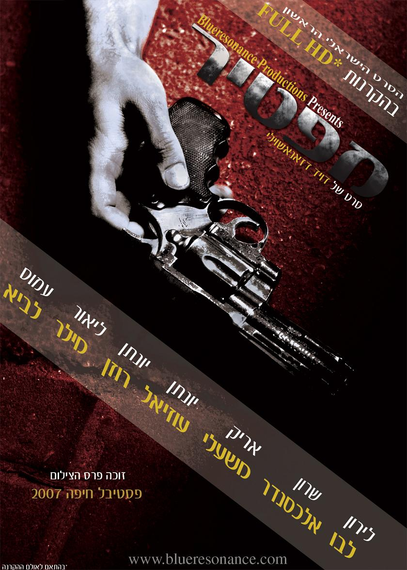 פוסטר הסרט "מפטיר" שזכה פרס הצילום הטוב ביותר בפסטיבל חיפה 2007